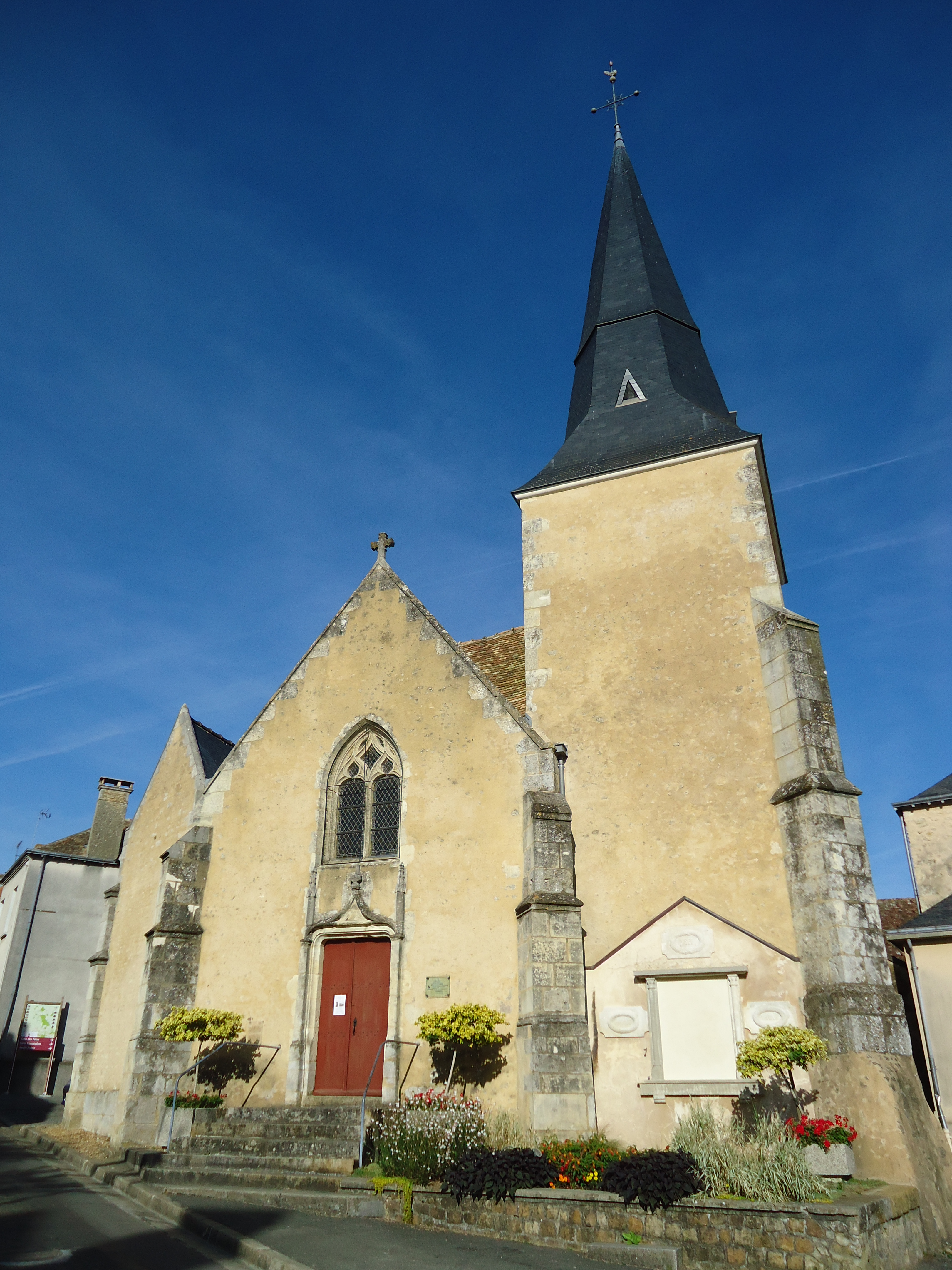 Eglise Saint-Augustin - Contres - Saint-Cosme-en-Vairais - Sarthe (72)